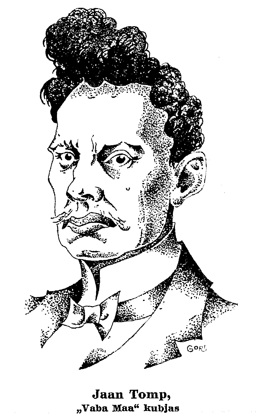 Gori šarž Jaan Tomp'ist